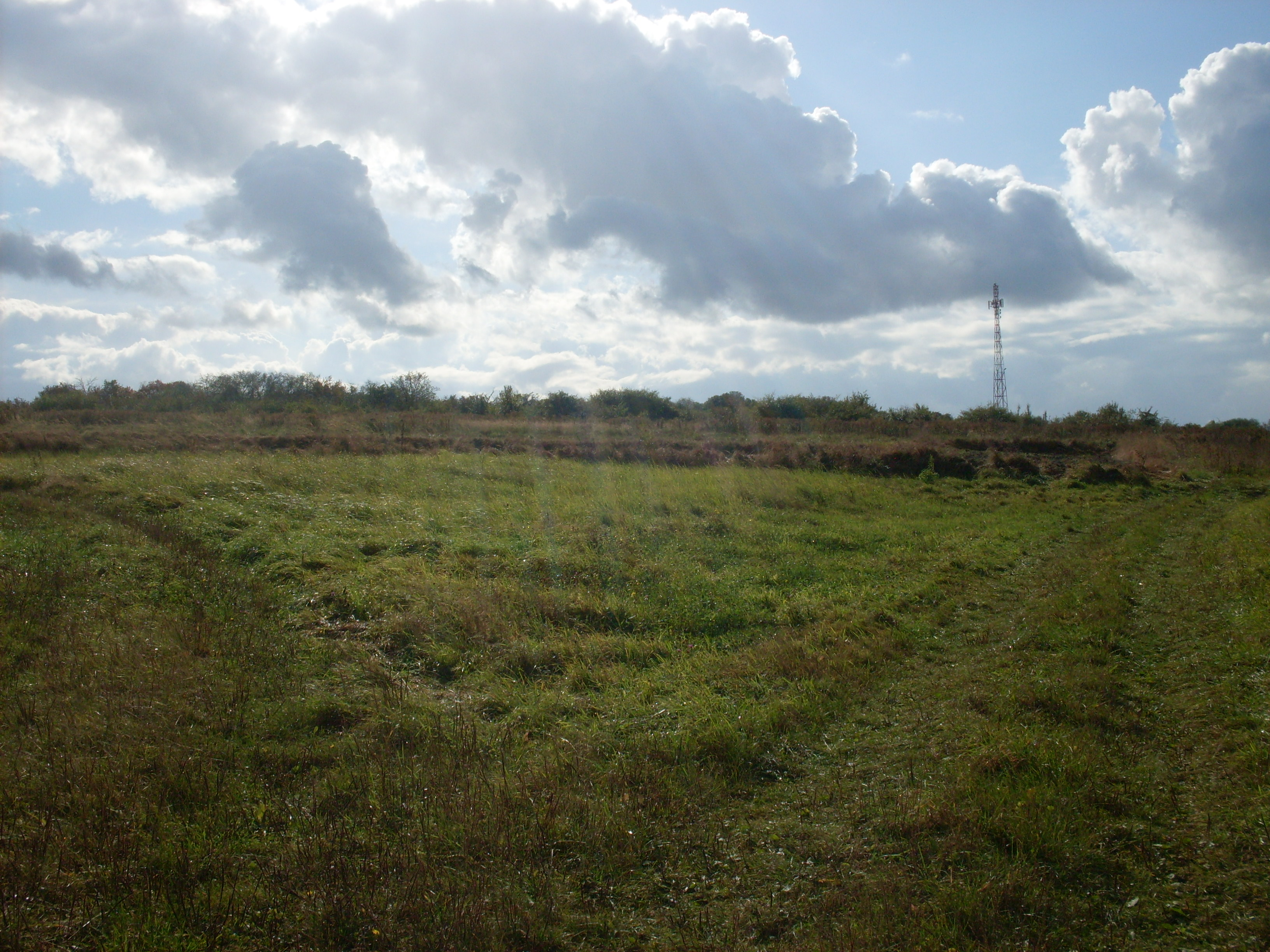 Liguniowa Góra.Zalas